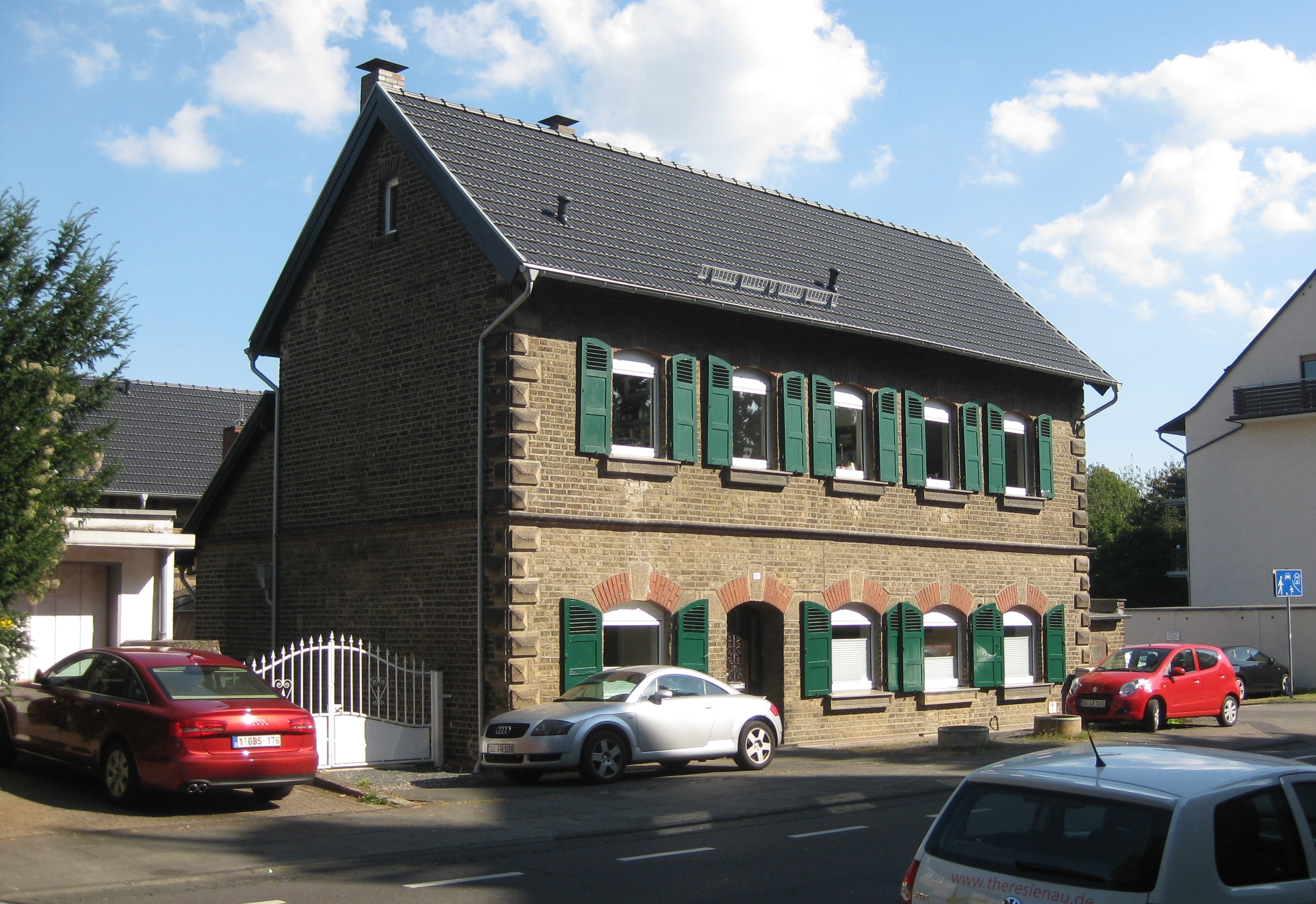 Denkmalgeschütztes Haus, Königswinterer Straße 803, Bonn-Oberkassel This is a photograph of an architectural monument. 3629